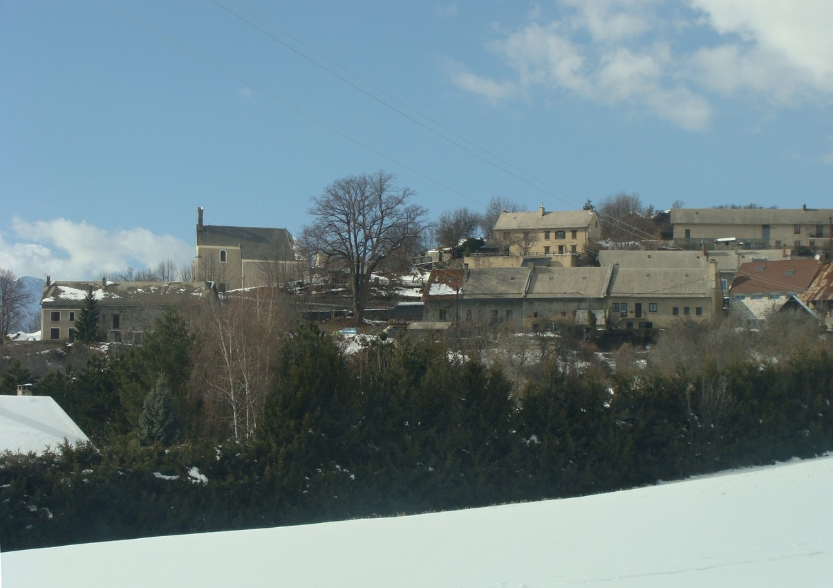 Le hameau de Rissents vu de Buissard-village, en hiver.